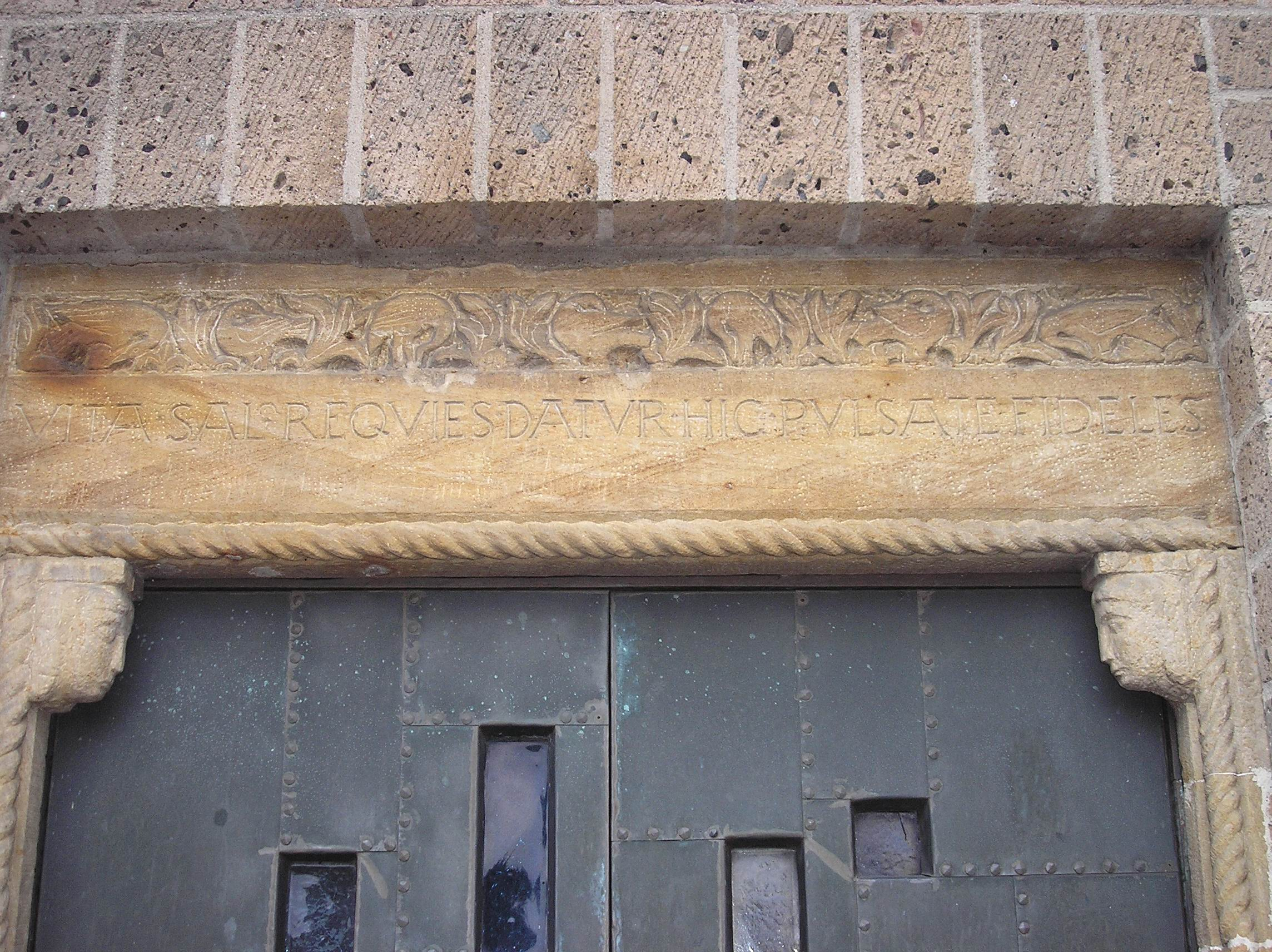 Türsturz der Kirche St. Martin in Zyfflich mit lateinischer Inschrift